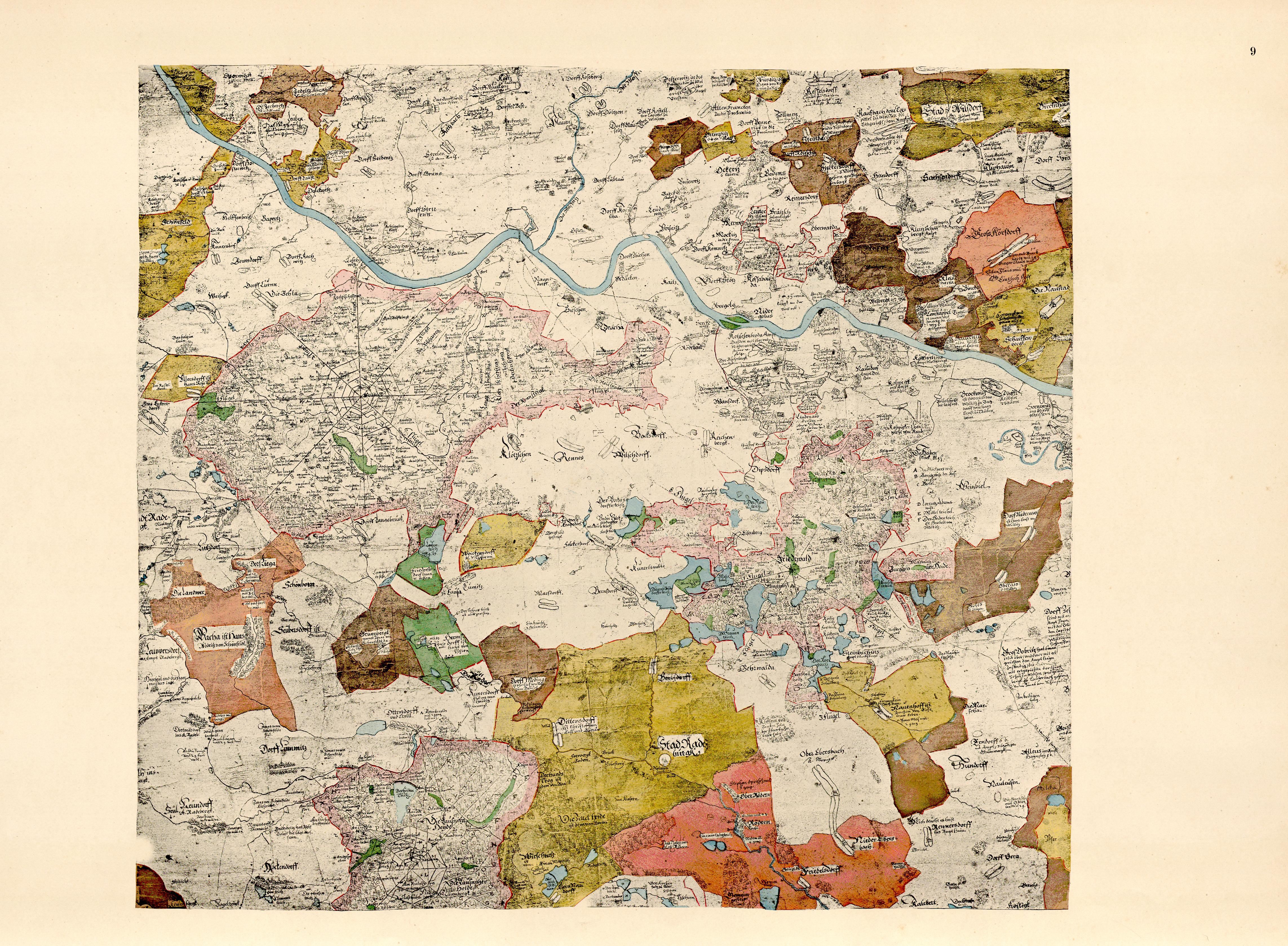 Tafel IX aus Oeder, Matthias: Die erste Landesvermessung des Kurstaates Sachsen Auf Befehl Des Kurfürsten Christian I. ausgeführt von Matthias Oeder (1586-1607) ; Zum 800Jährigen Regierungs-Jubiläum Des Hauses Wettin. Stengel & Markert, Dresden 1889.